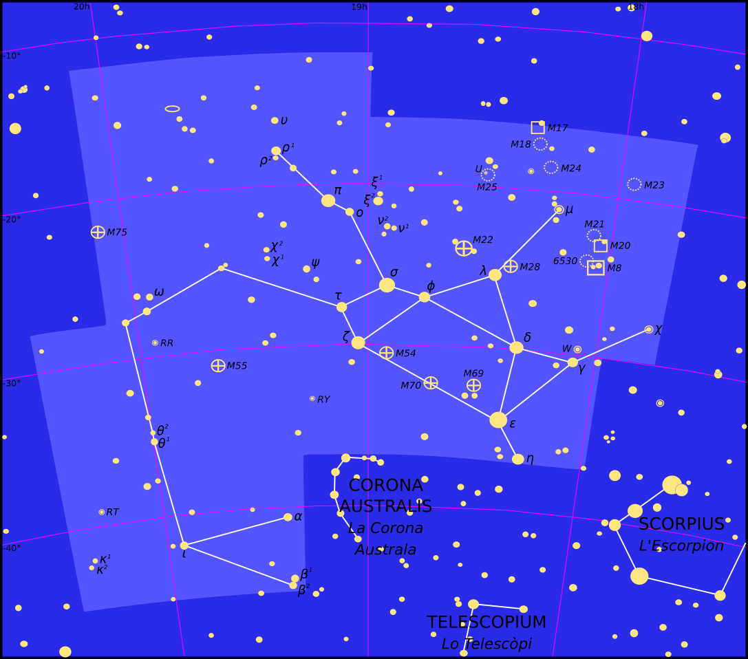 Constellacion dau Sagitari.